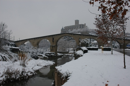 Pont Vell, Manresa, (Catalunya).